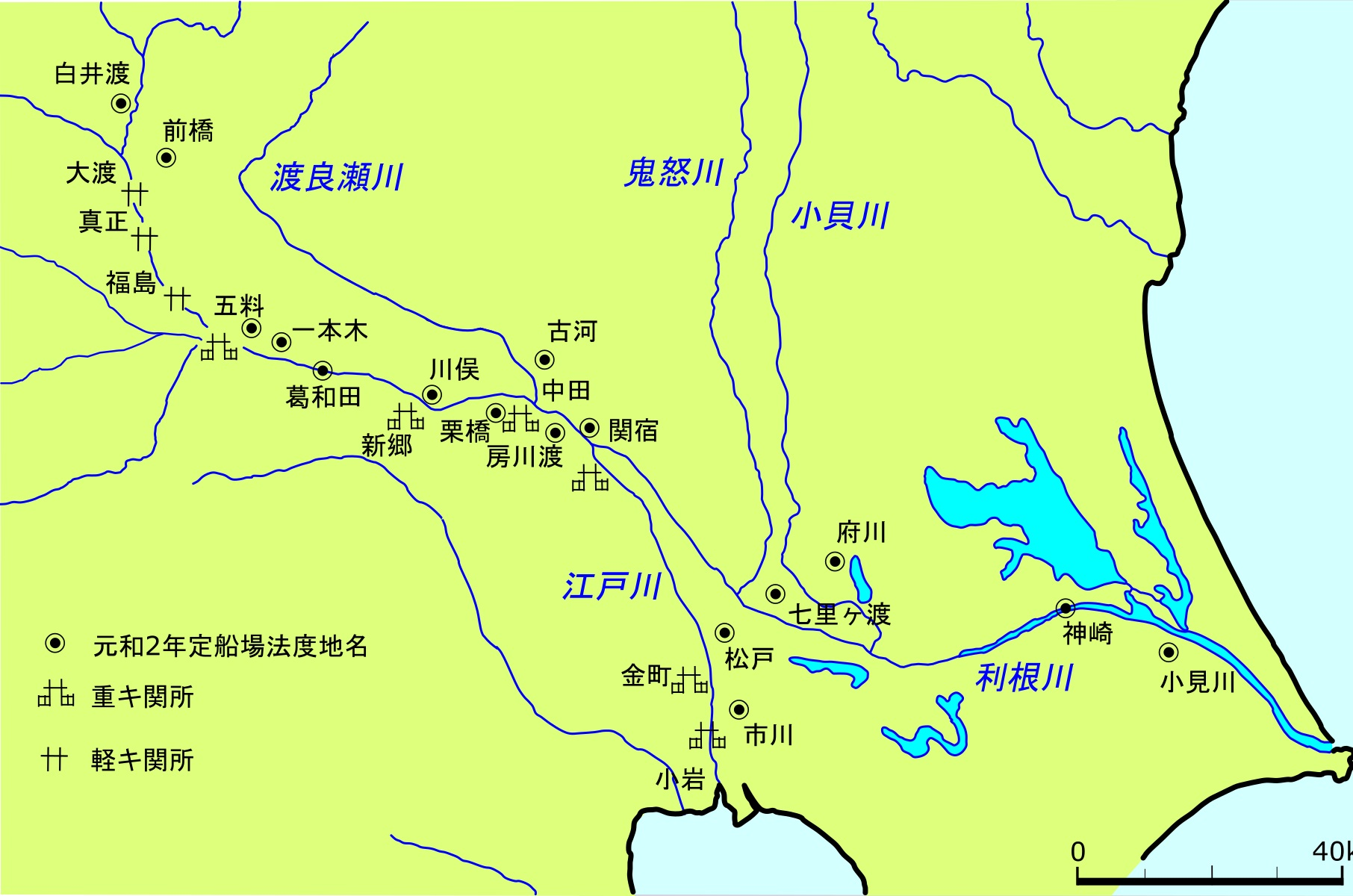 江戸時代の利根川・江戸川に配置された、関所と定船場の配置図。 原図は、渡辺和敏『近世交通制度の研究』吉川弘文館、平成3年、514頁拠り。